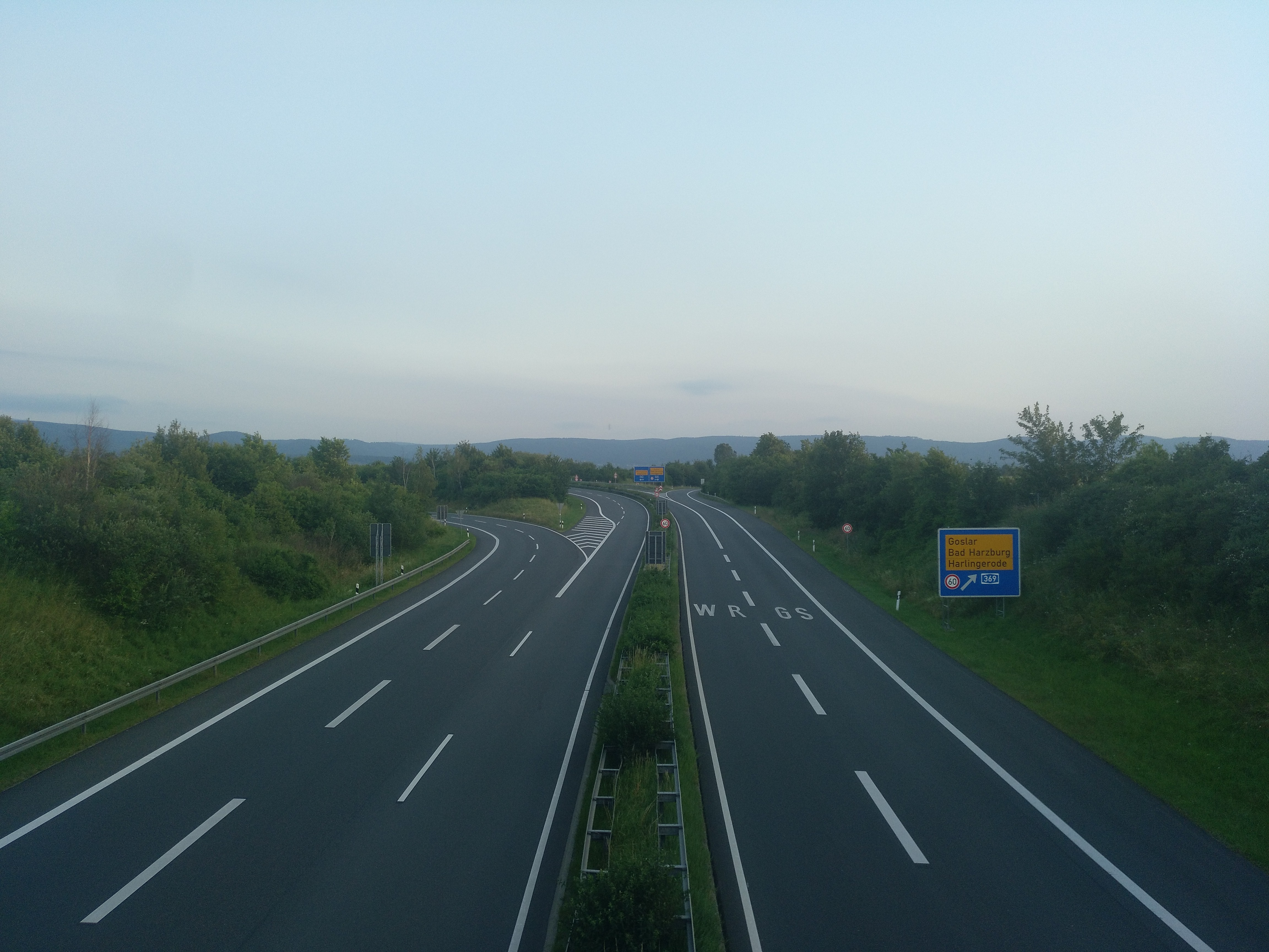 Blick von der Brücke der Kreisstraße zwischen Vienenburg und Lochtum auf die Bundesautobahn 36 und das Autobahndreieck Vienenburg, 26. Juni 2019.